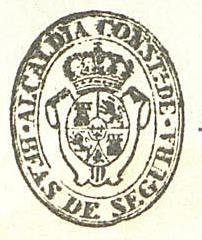 Sello de Beas de Segura